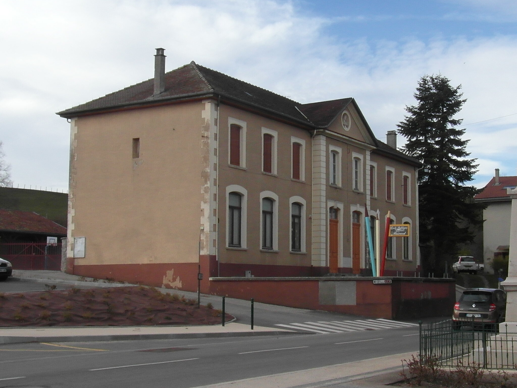 École du Haut-Biol en mars 2019